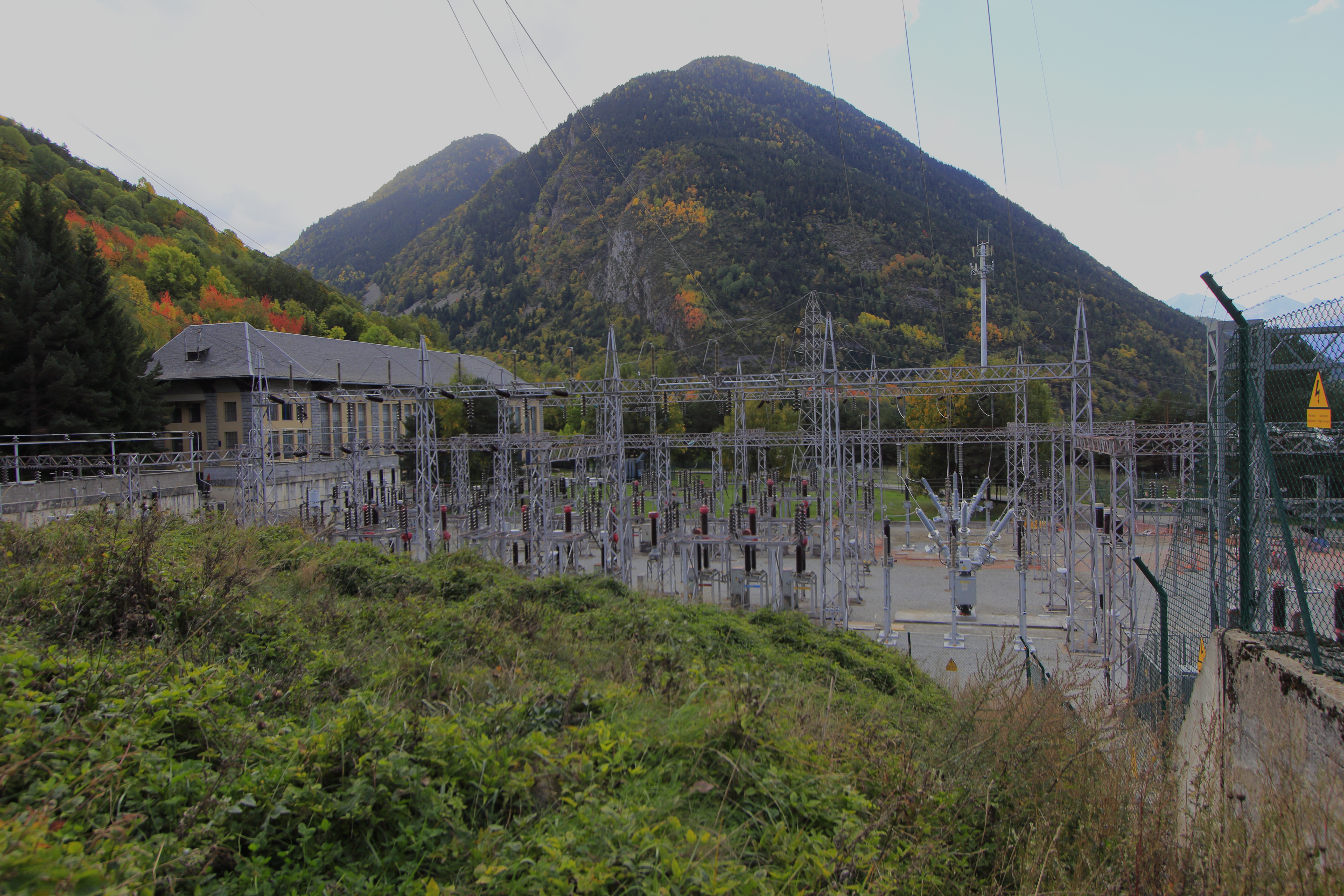 Sortida de les 2 línies d'alta tensió de la Central d'Arties; a l'esquerra, l'edifici de la sala de màquines de CH Arties i CH Aiguamoix